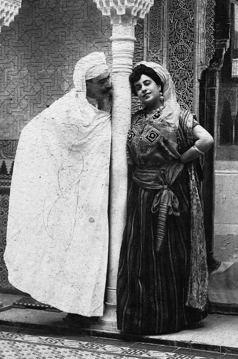 El pintor Mariano Bertuchi y su esposa ataviados a la usanza árabe, posando en La Alhambra, ilustración de la invitación a la exposición En La Alhambra. Cortesía de Fidel Villar Ribot.